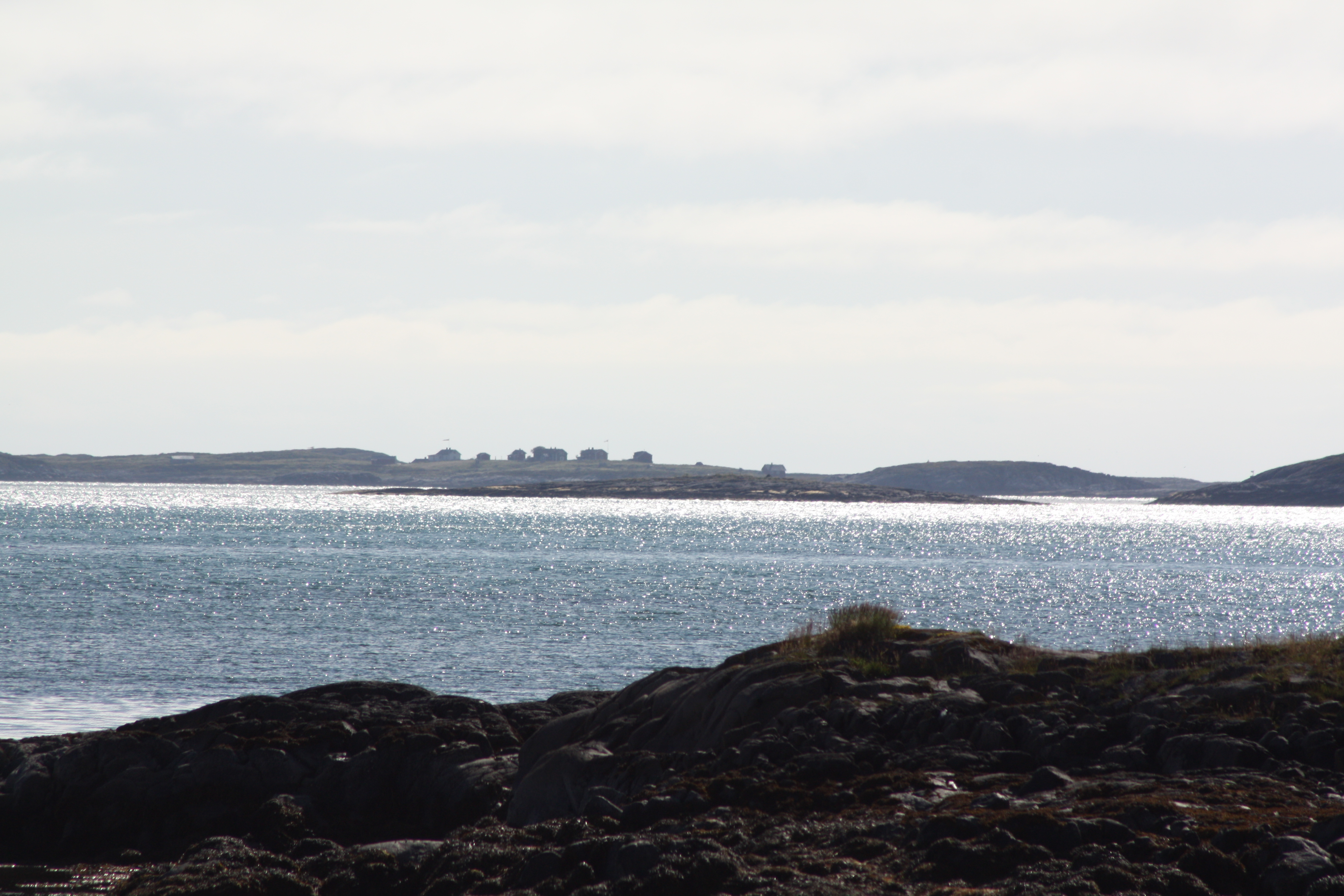 Muddværet i Vega sett fra Eidem